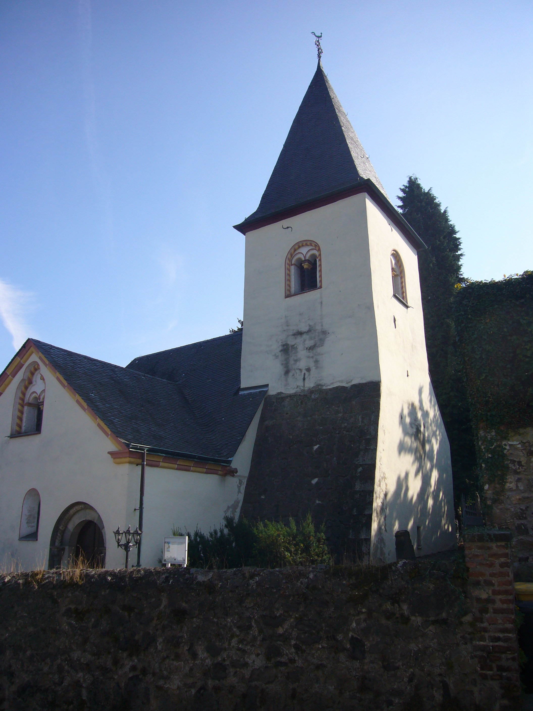 Die katholische Pfarrkirche (Alt) St. Martin in Muffendorf, Bonn-Bad Godesberg